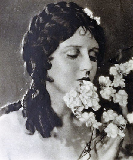 Jacqueline Gadsden (Jane Daly)